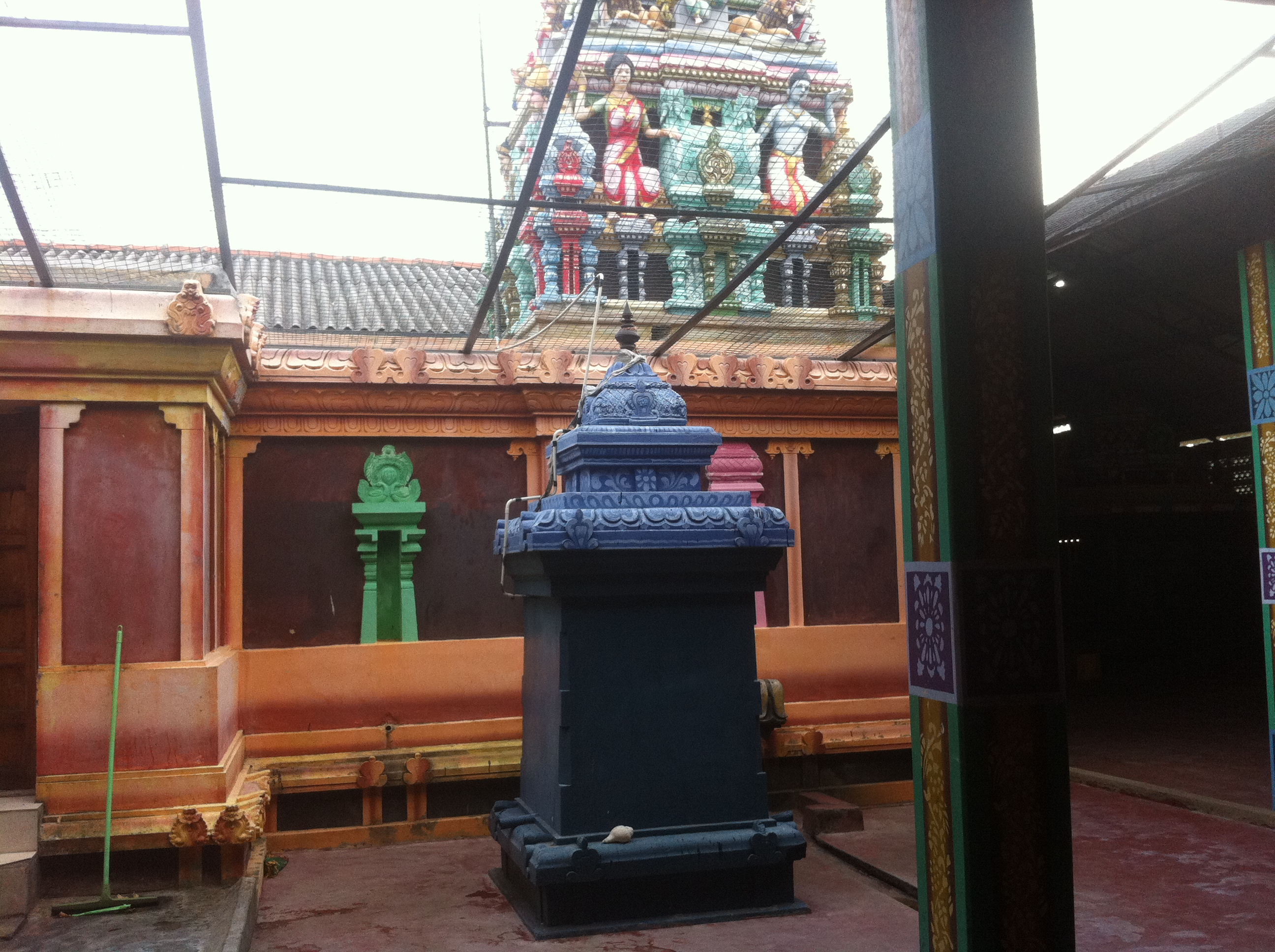 ஆலய உட்புற வீதியும் கர்ப்பக்கிரகத்தோடு சேர்ந்து கொடித்தம்பத்தின் தோற்றமும்.